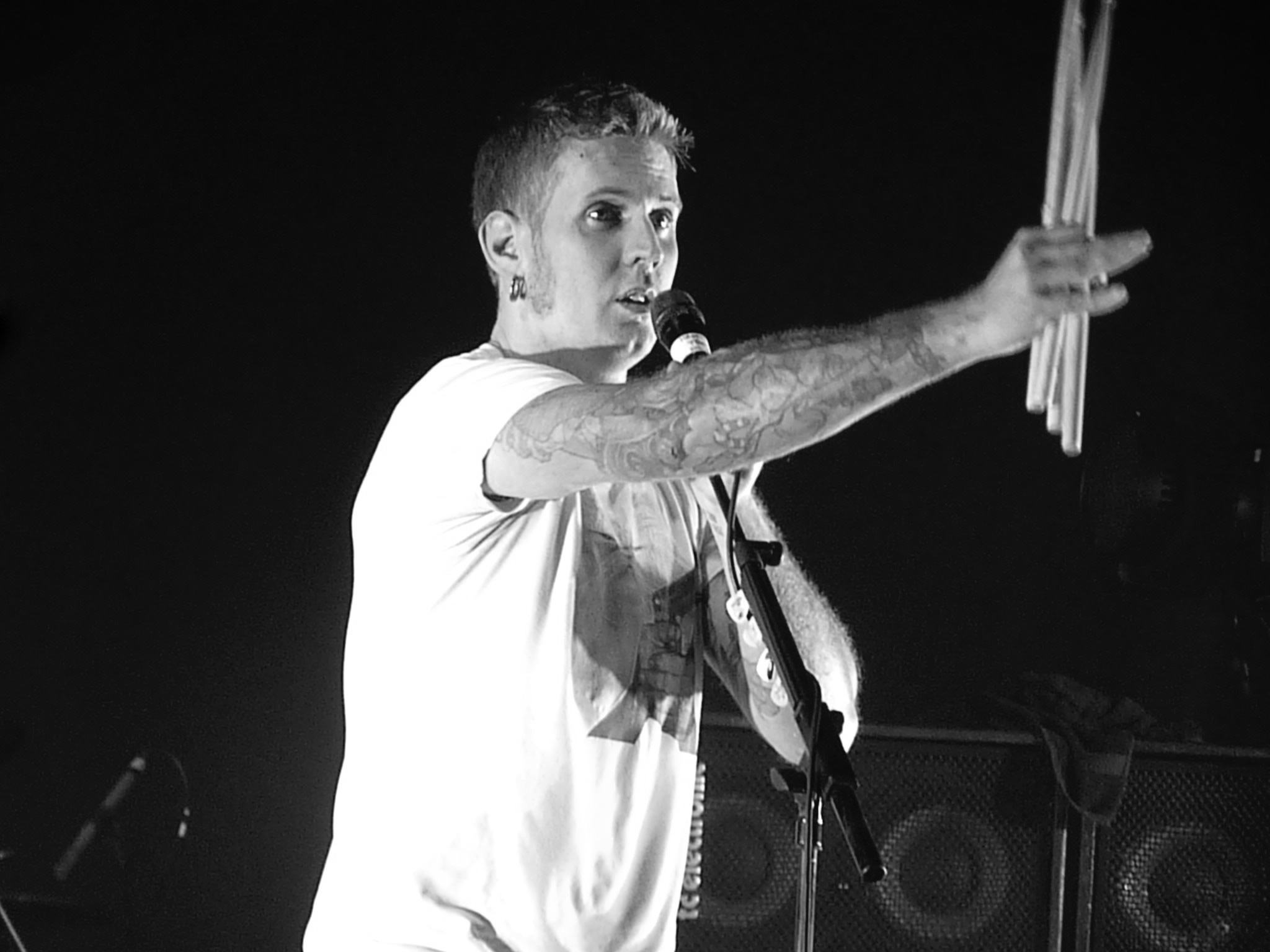 Brann Dailor, batería de Mastodon, actuando en la sala Razzmatazz de Barcelona, en enero de 2012.